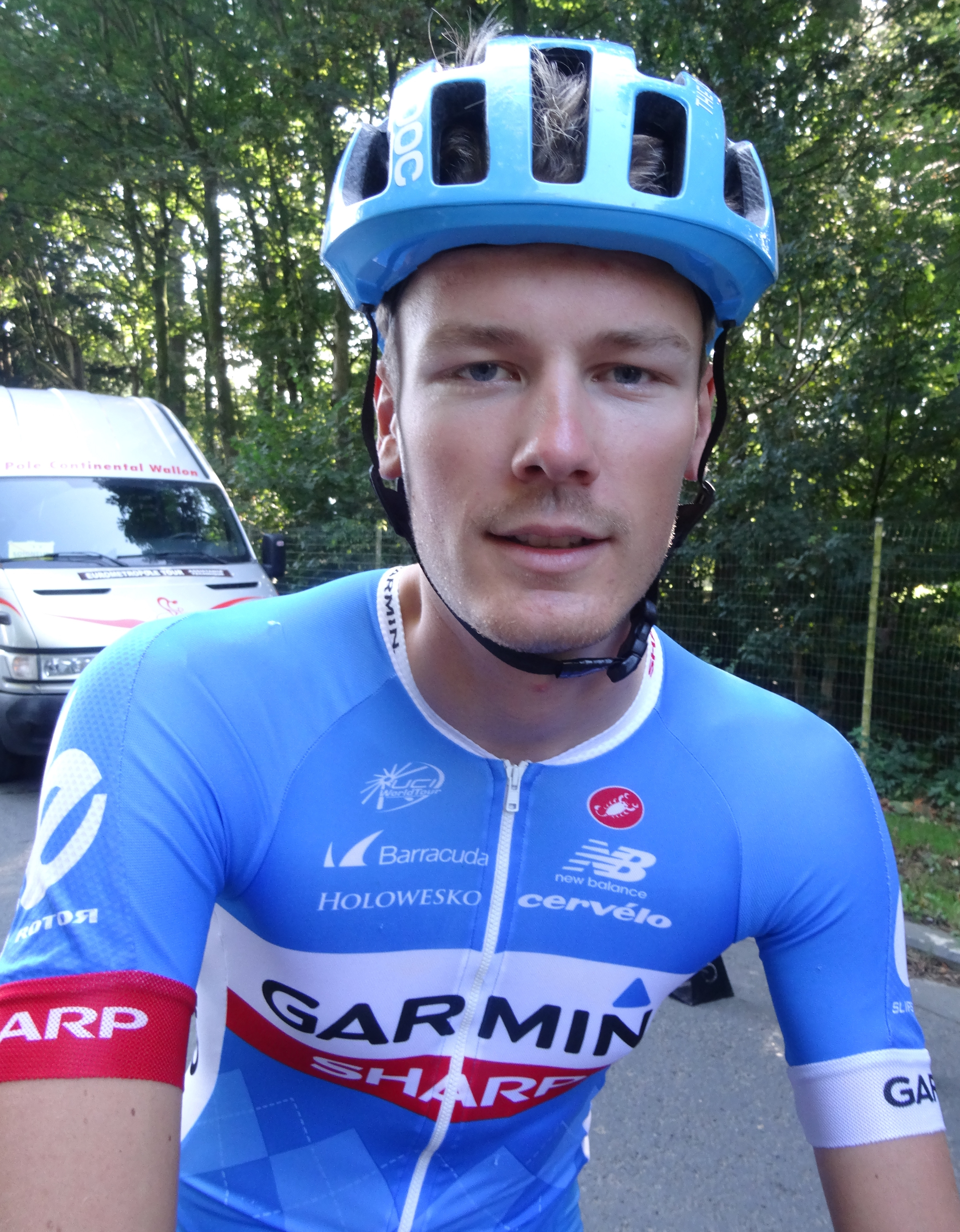 Reportage photographique réalisé le vendredi 3 octobre à l'occasion du départ de la deuxième étape de l'Eurométropole Tour 2014 à Estaimbourg (Estaimpuis), Belgique.